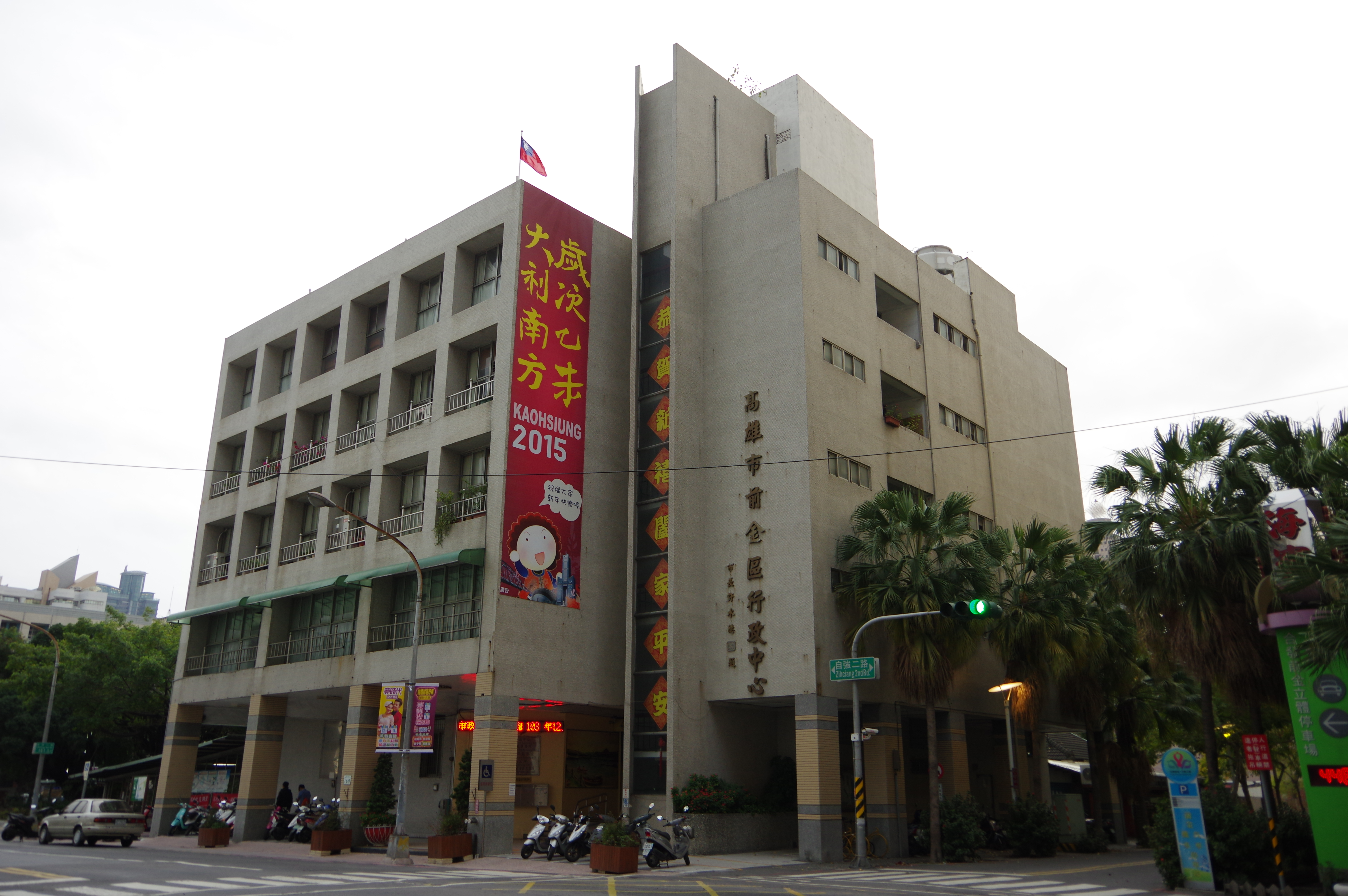 高雄市前金區行政中心